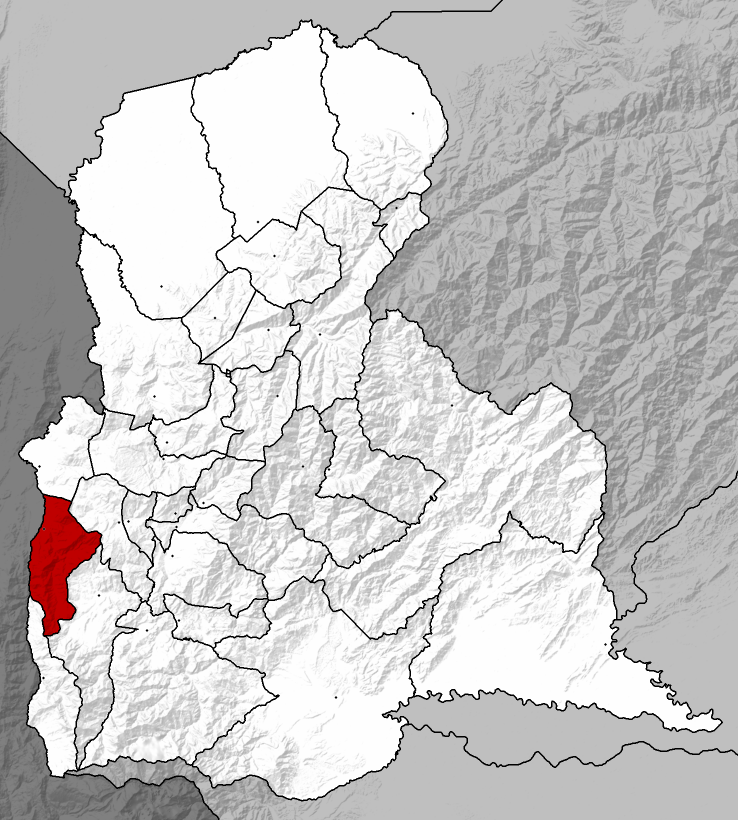 Municipio Bolívar - Táchira